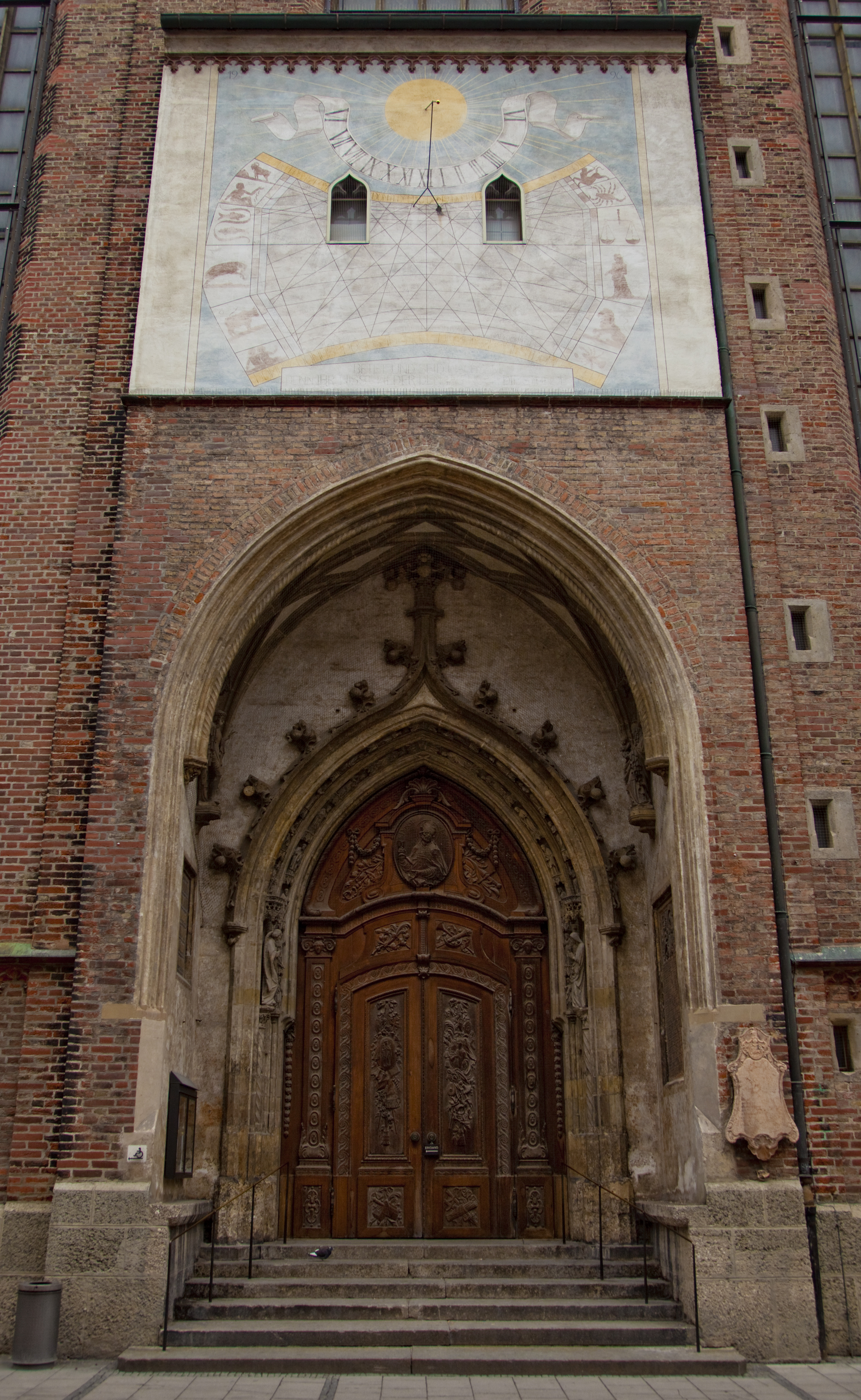 Das südöstliche Brautportal der Fraunekirche München mit Sonnenuhr